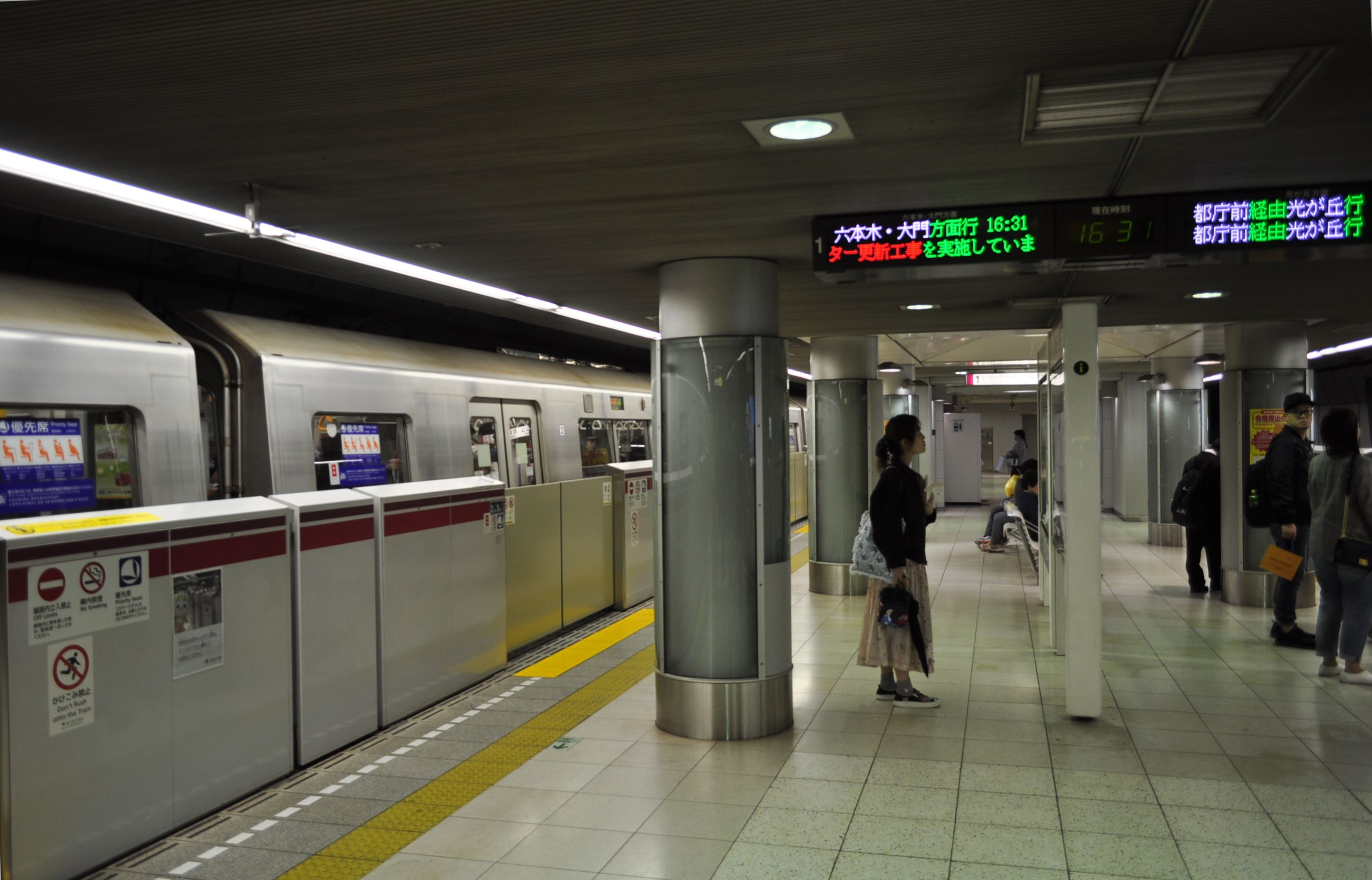 青山一丁目駅 大江戸線ホーム